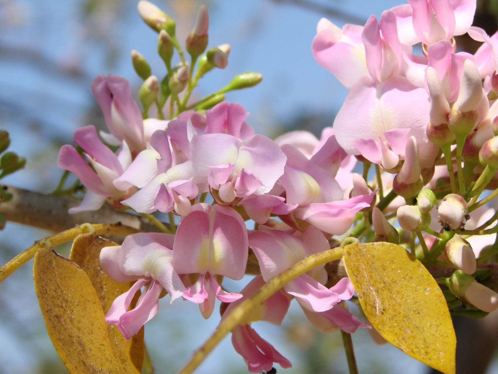 Gliricidia sepium (Jacq.) Kunth. ex Walp. - FABACEAE - Espécie que no Brasil ocorre na Caatinga (CE, PB e RN), cultivada no cerrado - SQN 204 Brasília - Distrito Federal - Brasil.